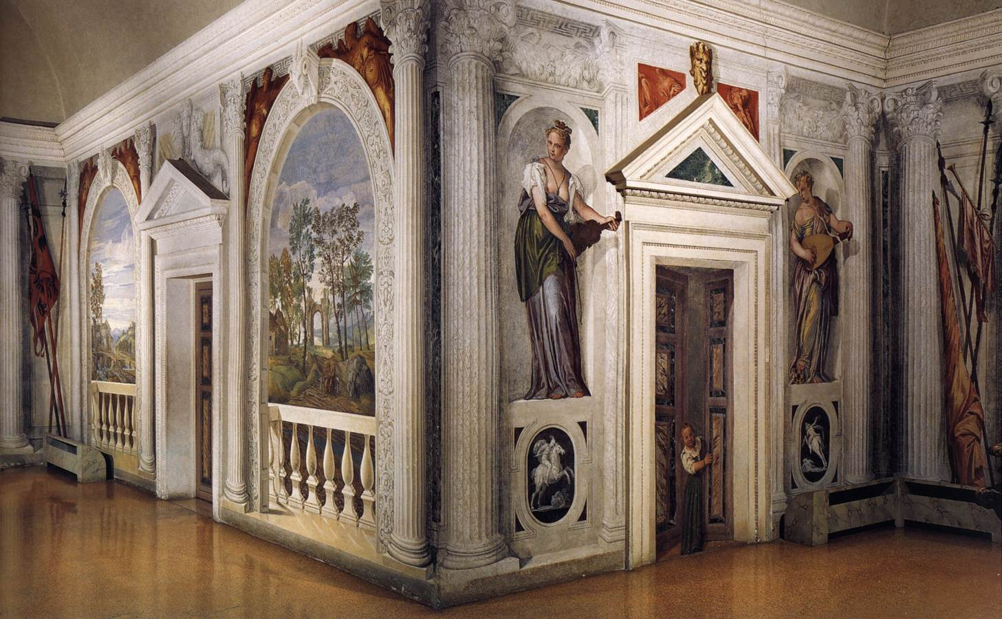 Вила Барбаро Изглед от Кръстовидната стая 1560 – 61 г. ü От двете срани на вратата са изобразени свирещи музи. Те сякаш приканват и посрещат посетителя в стаята.